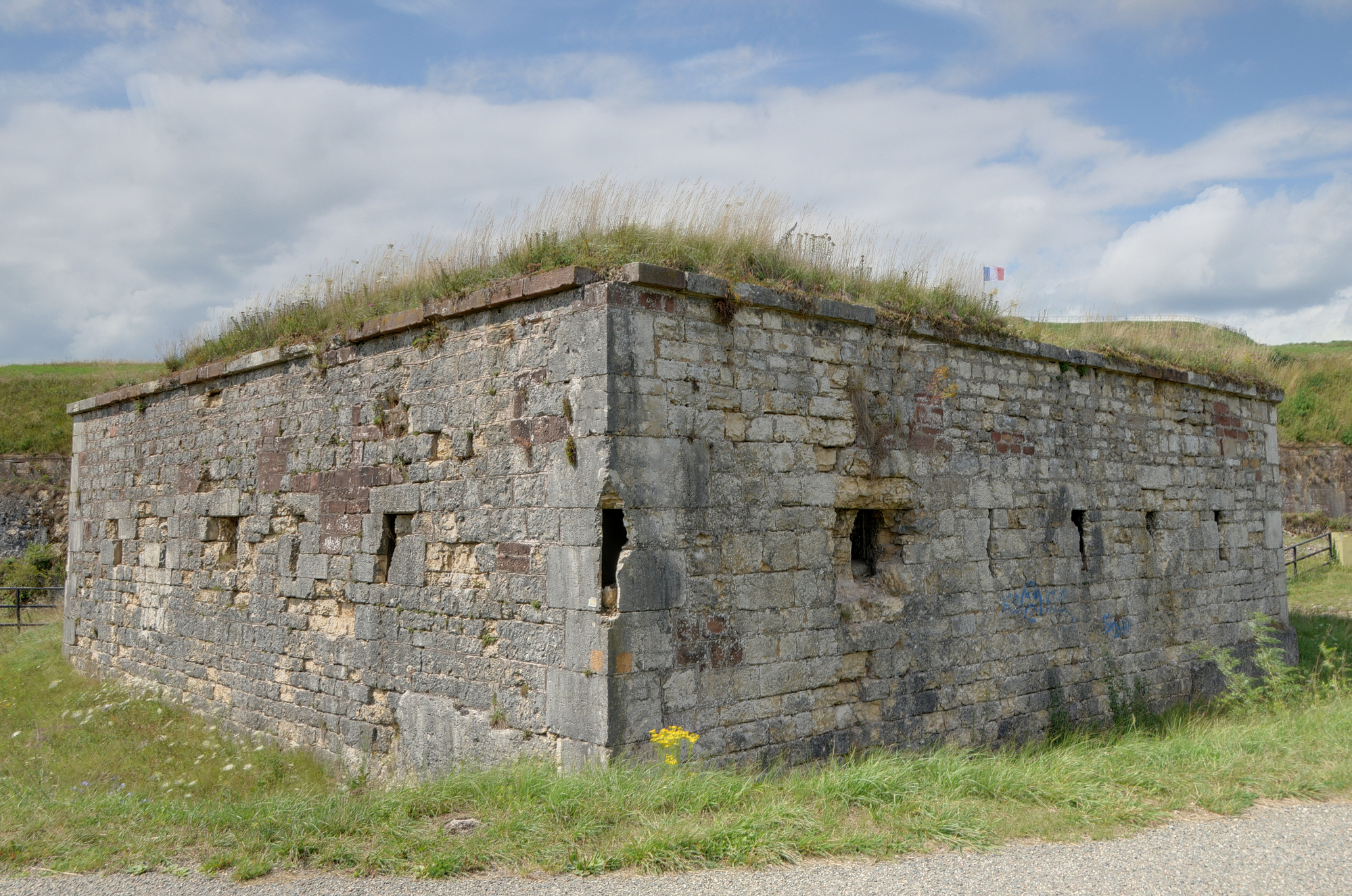 Demi-lune. Endroit où a été photographié le "fusillé souriant". Belfort fortifications (HDR).